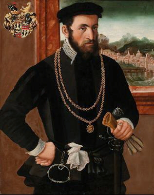 Portrait mit Wappen des kaiserlichen Rats und Pflegers (Oberamtmanns) von Bruneck in Südtirol, Anton Rummel von Lichtenau (gestorben 1590). [1] Ehegatte der Katharina Hahn von Hahnberg, Letzten ihres Geschlechts. [2] Mit ihm starb die Tiroler Zweig derer Rummel aus Nürnberg im Mannesstamm aus. Er hatte zwei Töchter.[3]